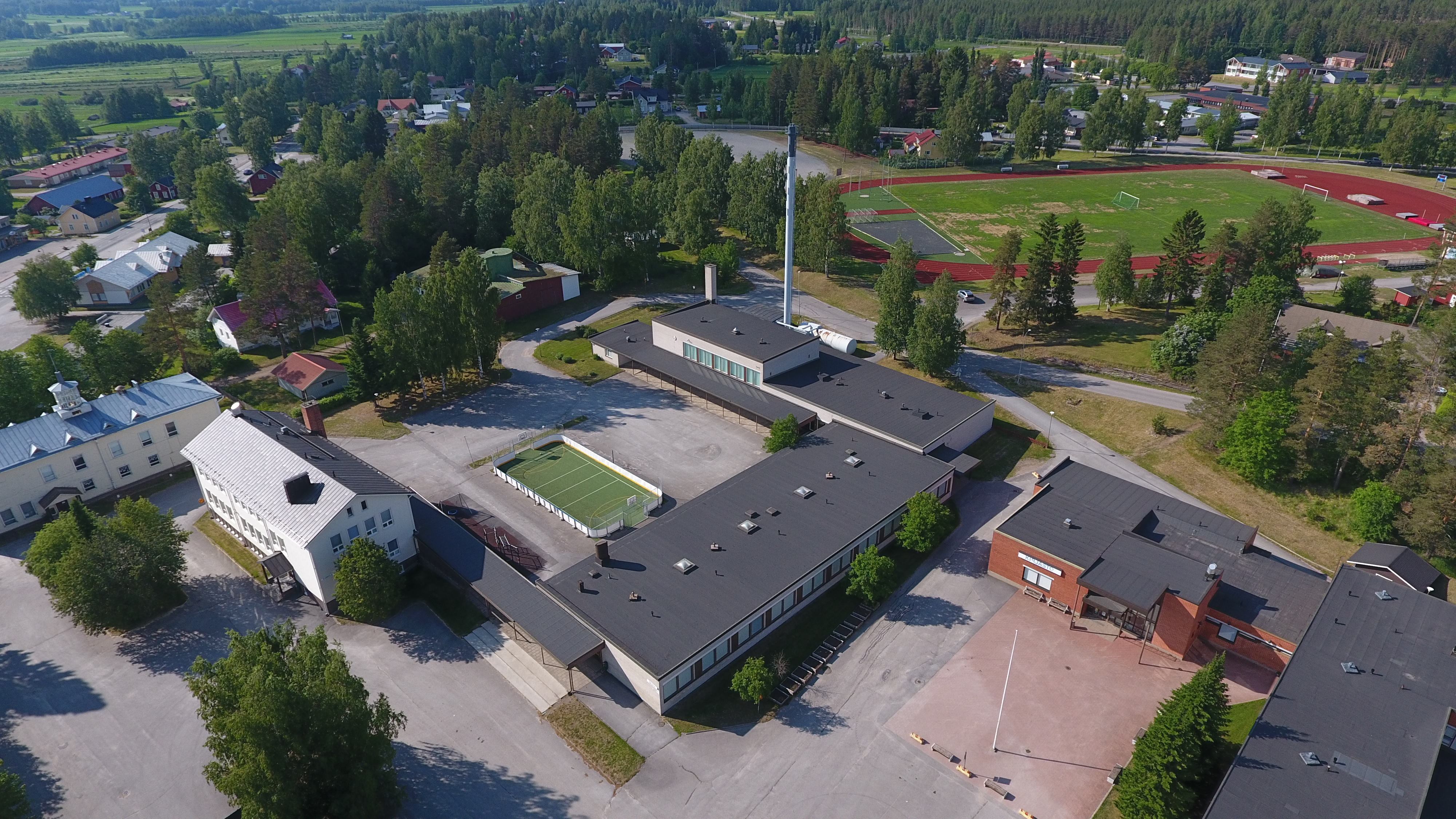 Vetelin lukio yläilmoista kuvattuna.